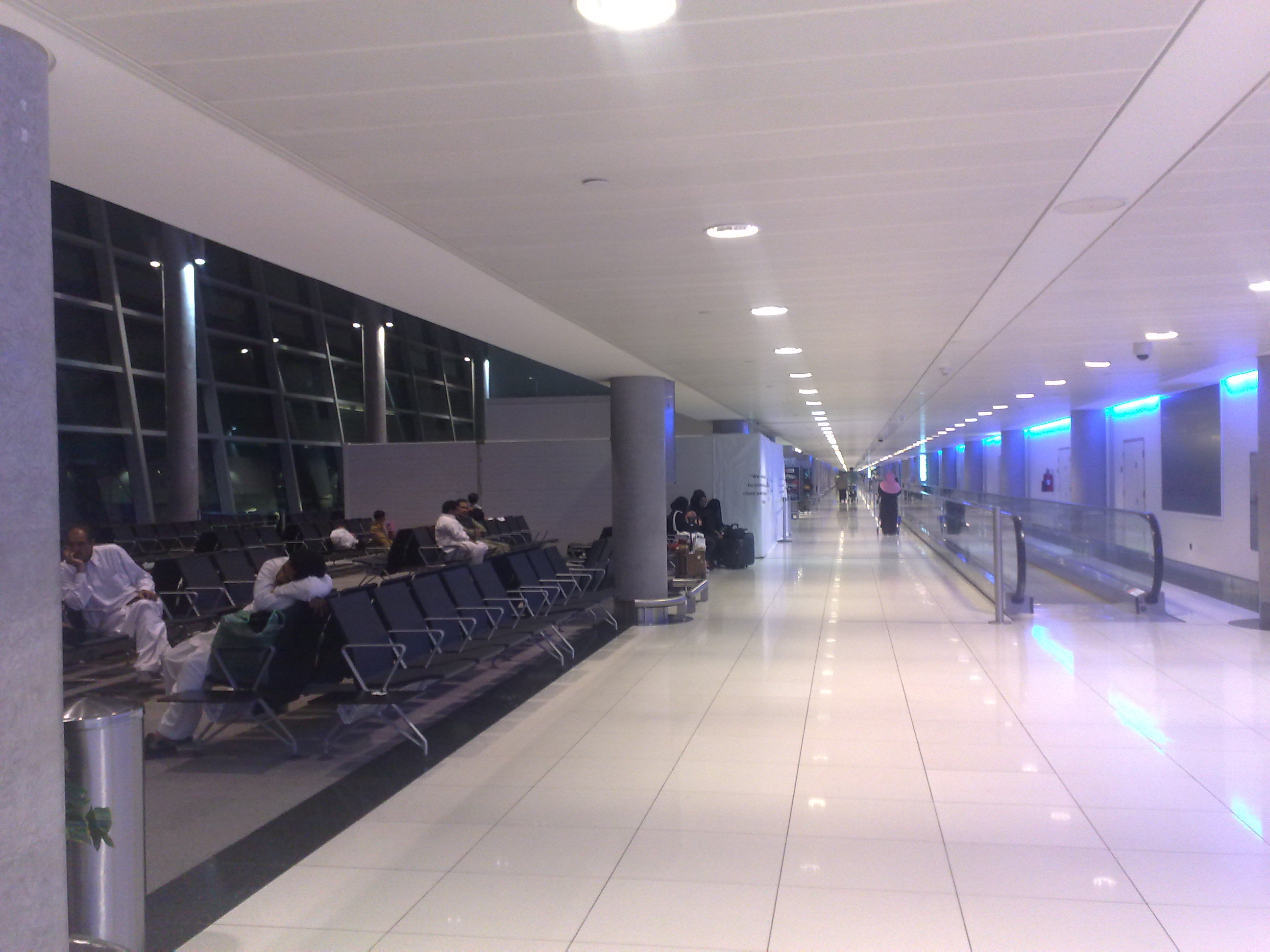 Inside Abu Dubai Airport